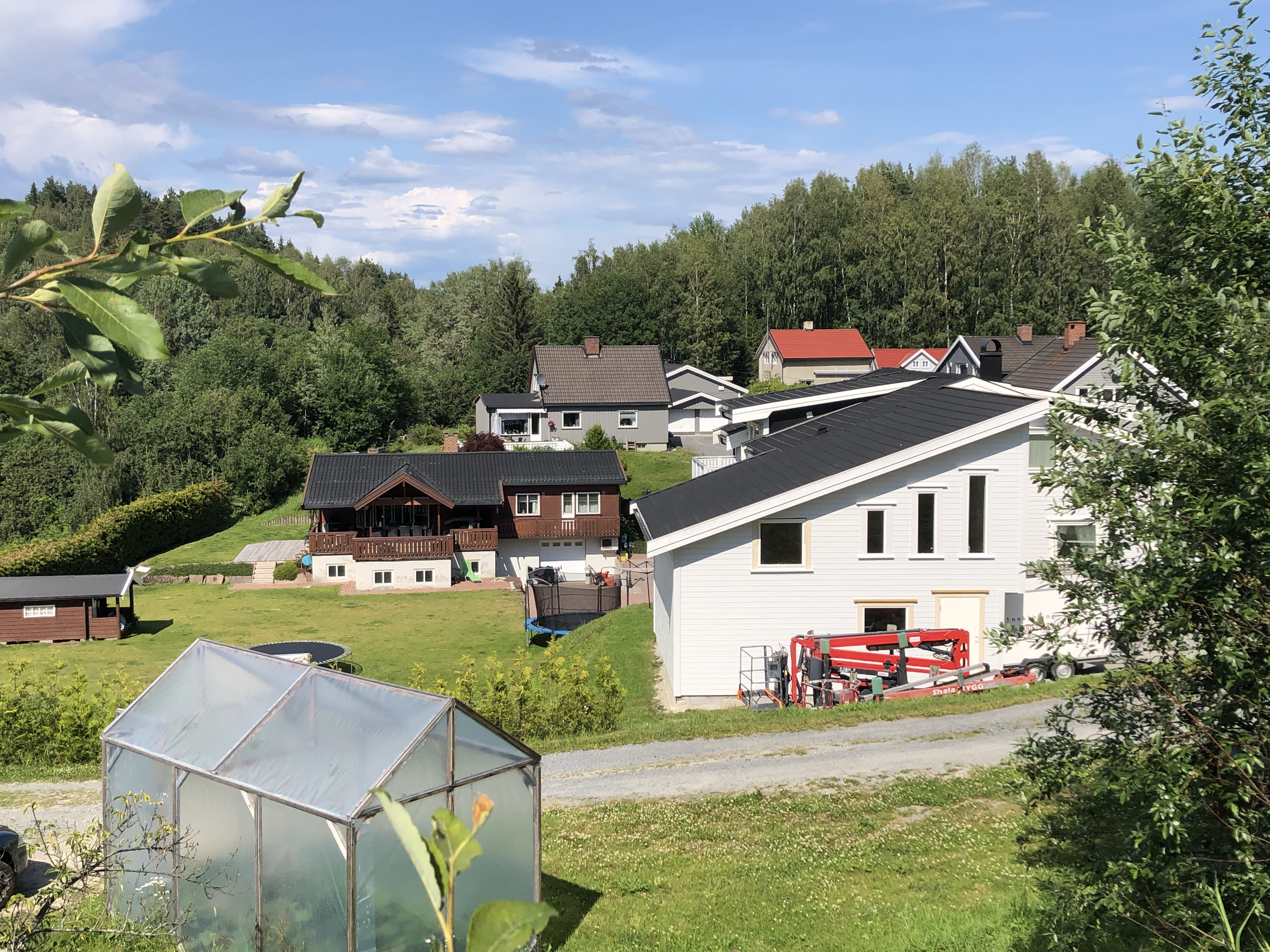 Vestliveien i Hønefoss.